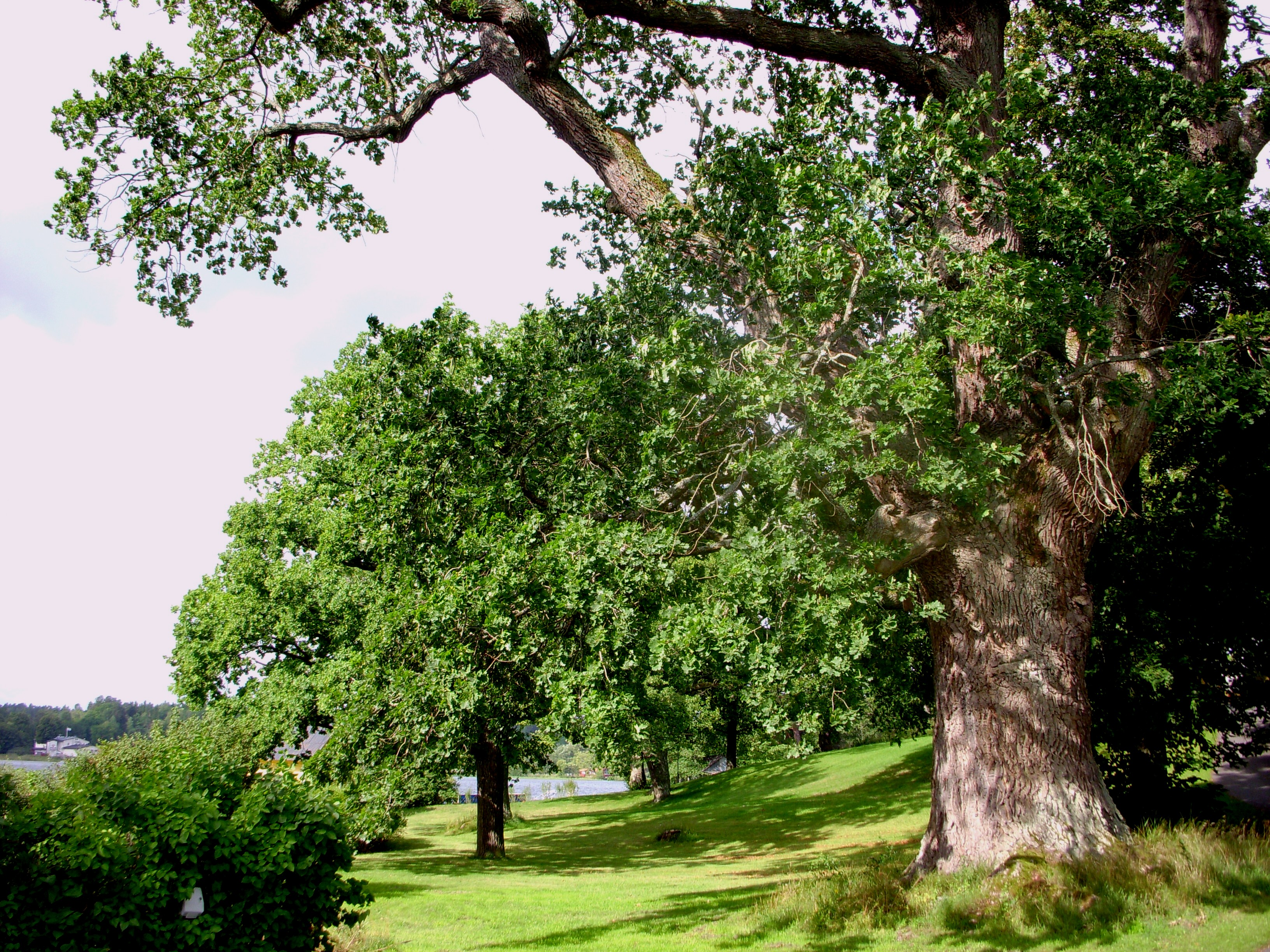 Tyska Botten vid Mälaren i Bromma, Stockholm